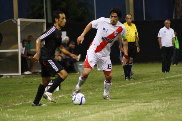 Paulo Centurión jugando para el Club Atletico River Plate Puerto Rico donde es el gafete de capitán del equipo, aca en la imagen enfrentando al equipo Indios de Mayagüez FC.